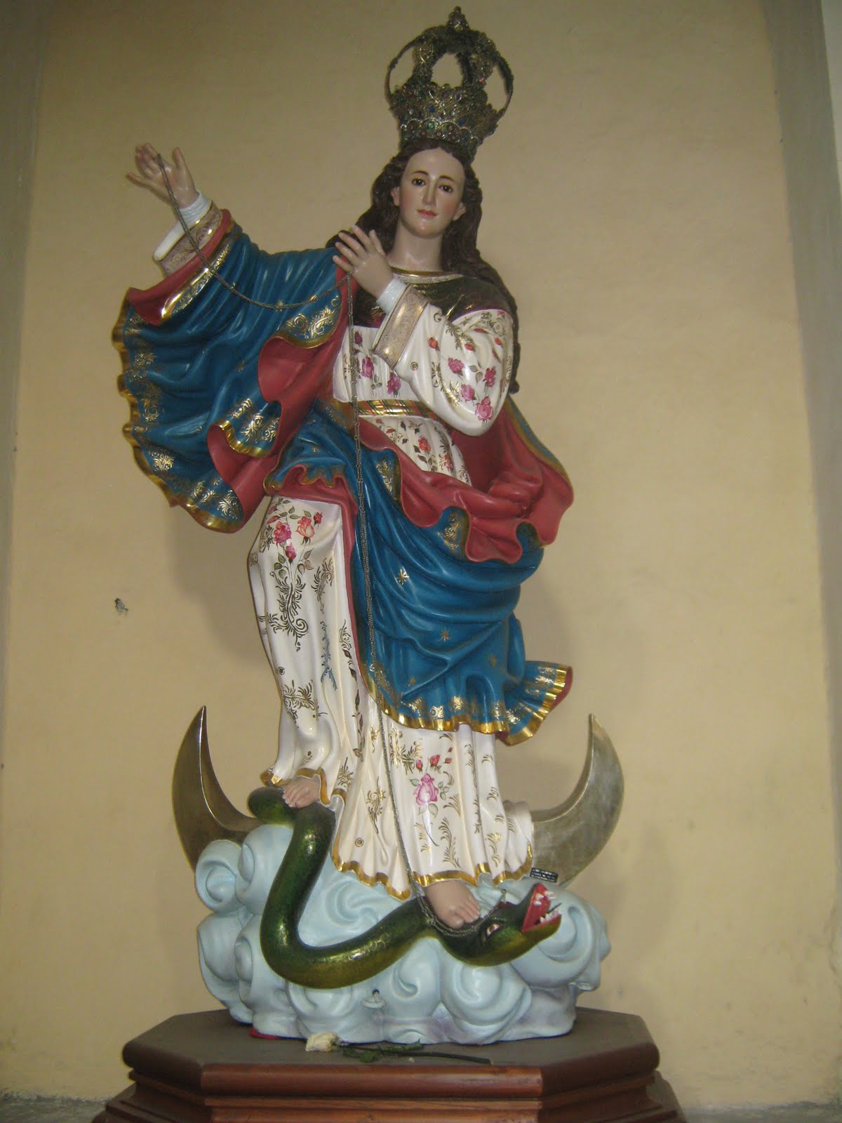 replica de la Inmaculada Concepción. Bernardo de Legarda. Siglo XVIII. Escuela Quiteña.